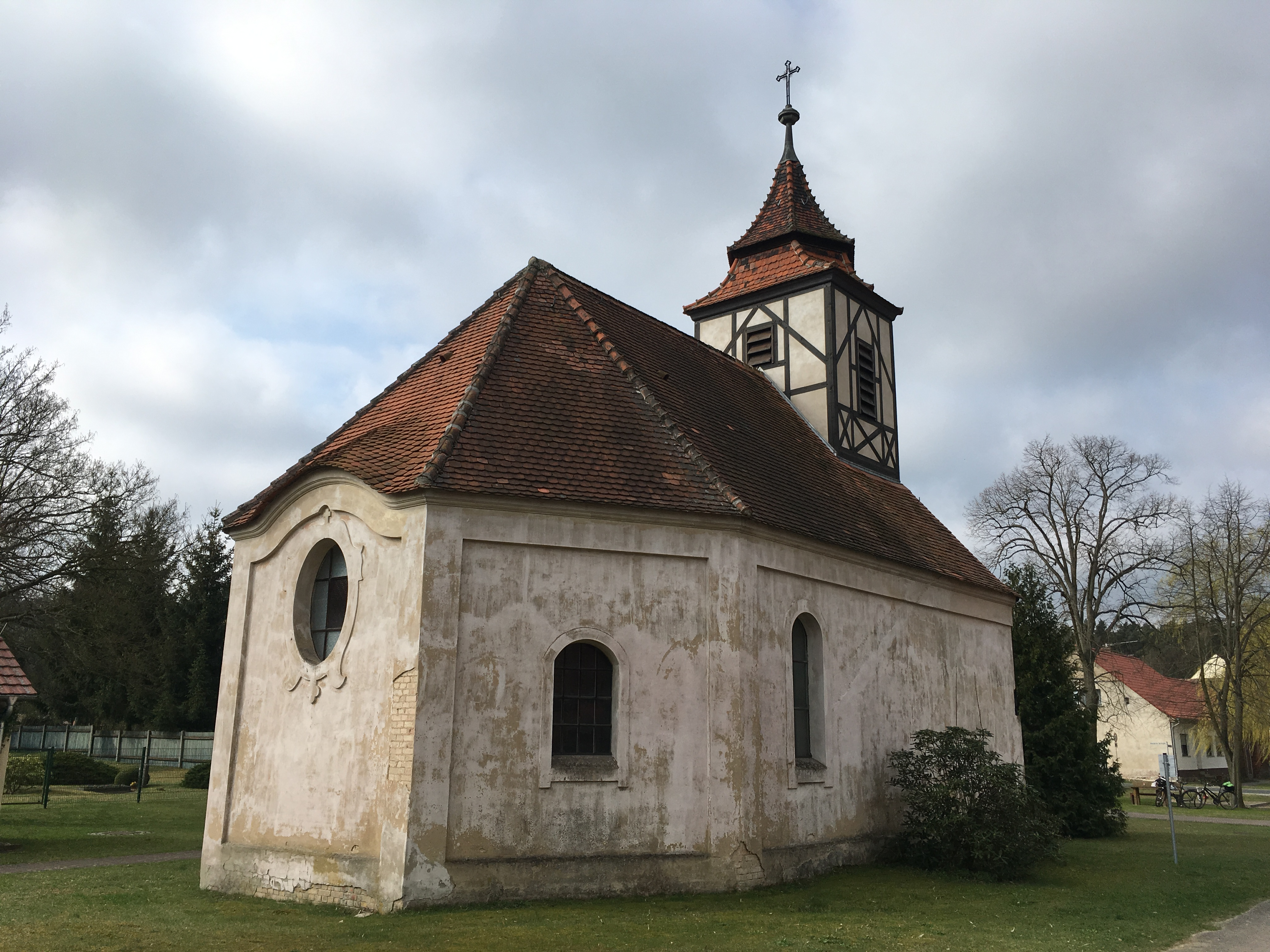 Die Dorfkirche in Klausdorf ist eine neubarocke Saalkirche in Klausdorf, ein Gemeindeteil des Ortsteils Bardenitz der Stadt Treuenbriezen. Die schlichte Ausstattung stammt aus der Bauzeit der Kirche.